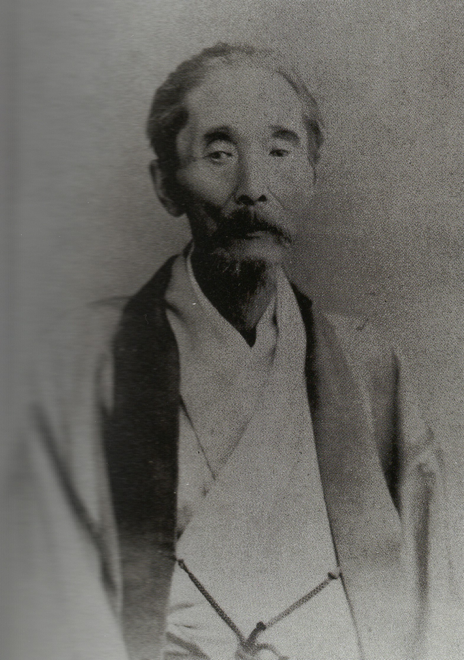 根岸友山の肖像写真。